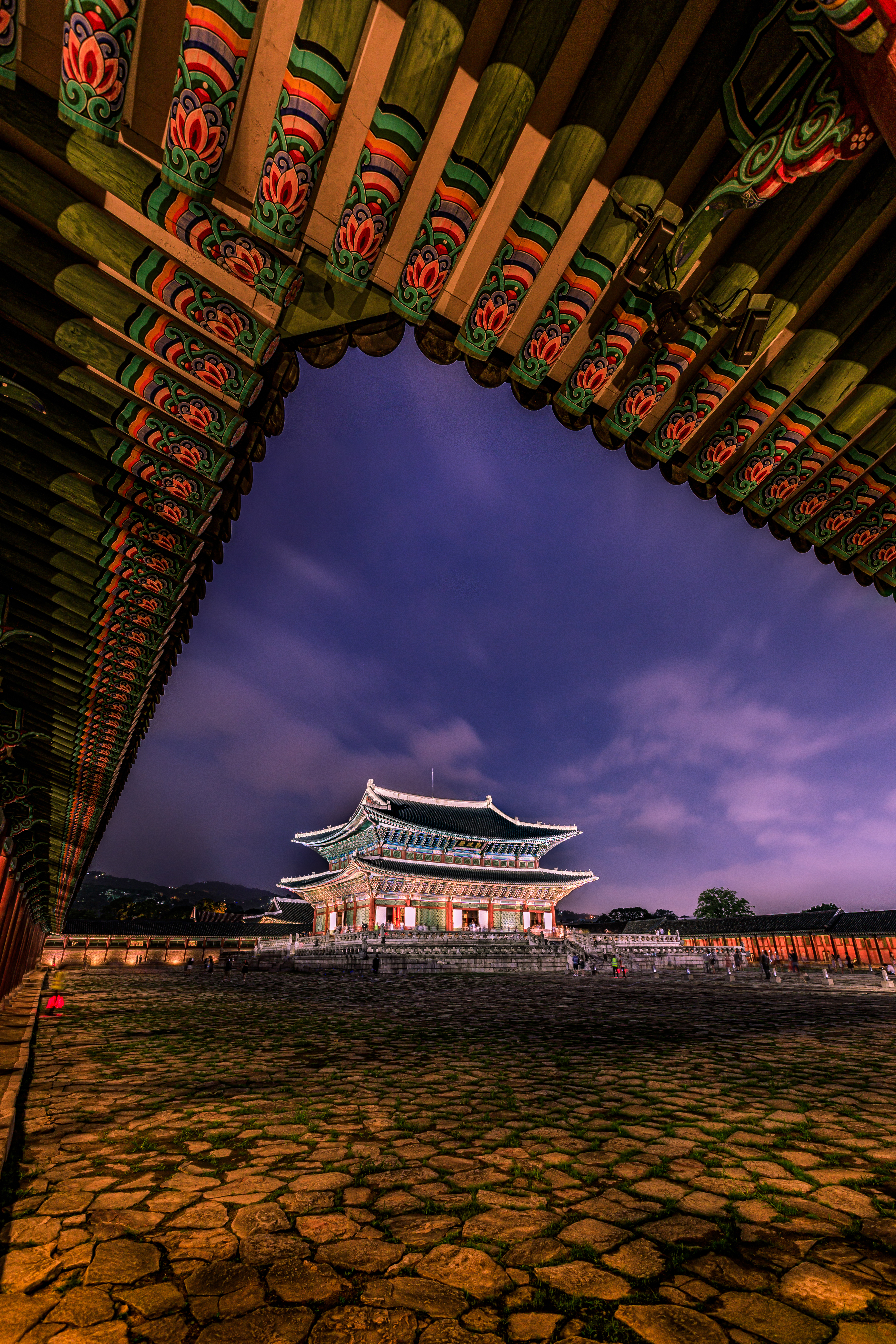 경복궁 근정전